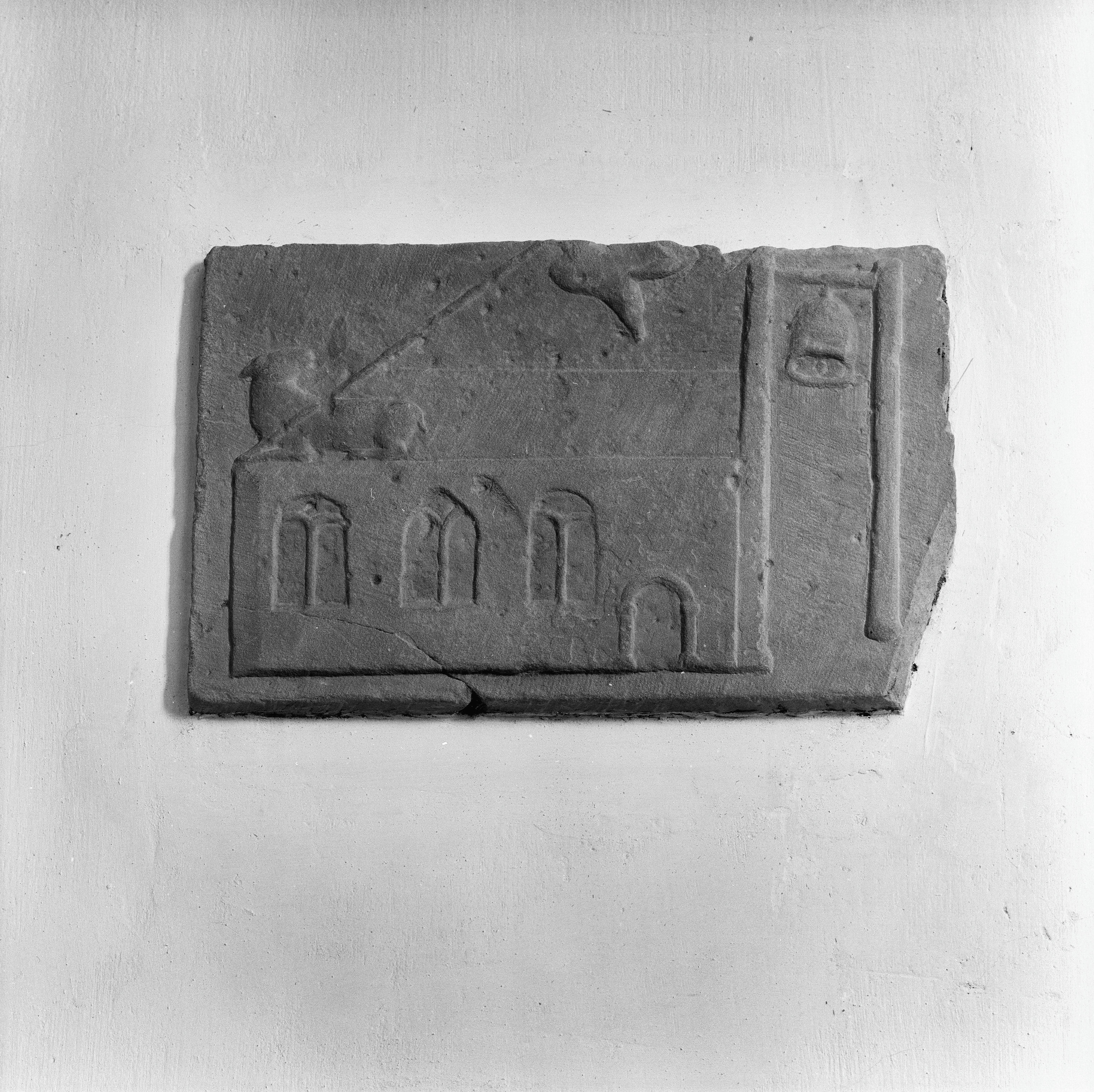 N.H.Kerk: steen met daarop een kerk afgebeeld